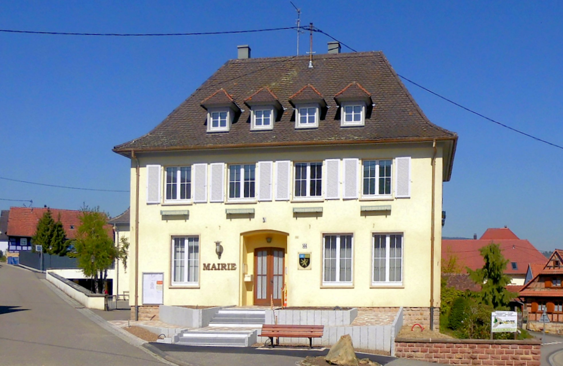 La mairie de Steinseltz